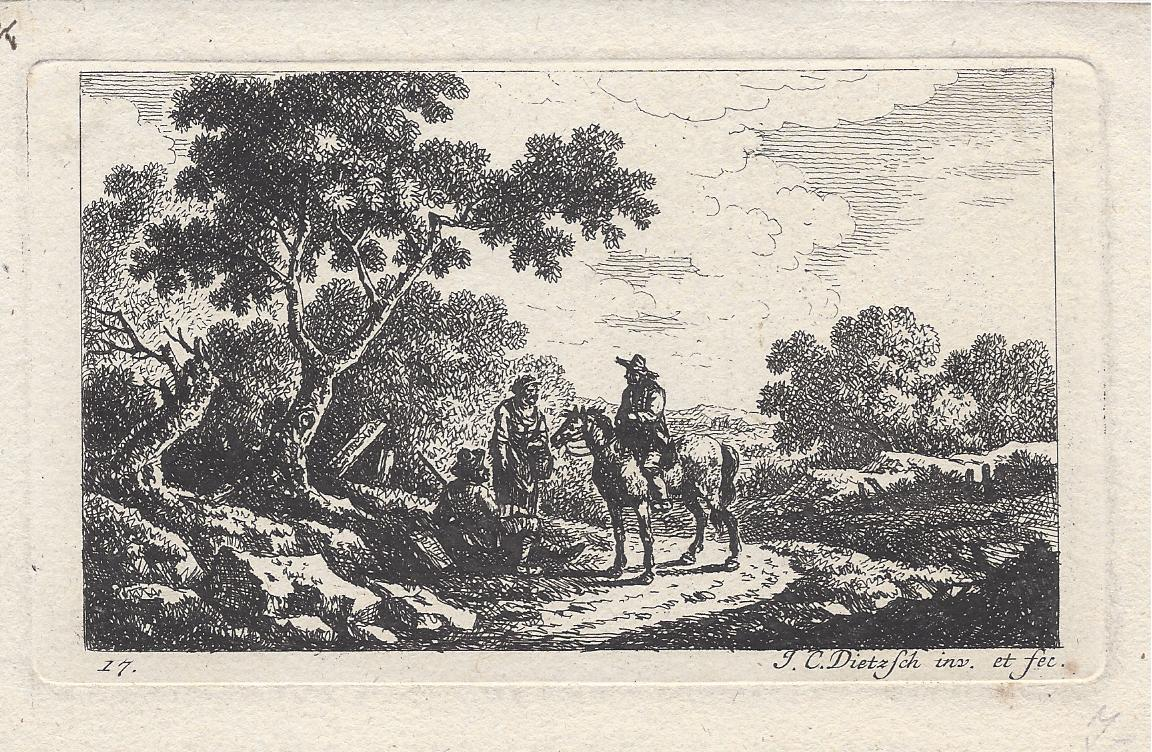 Johann Christoph Dietzsch: Reiter und Rastende, nach eigener Zeichnung gestochen um 1760